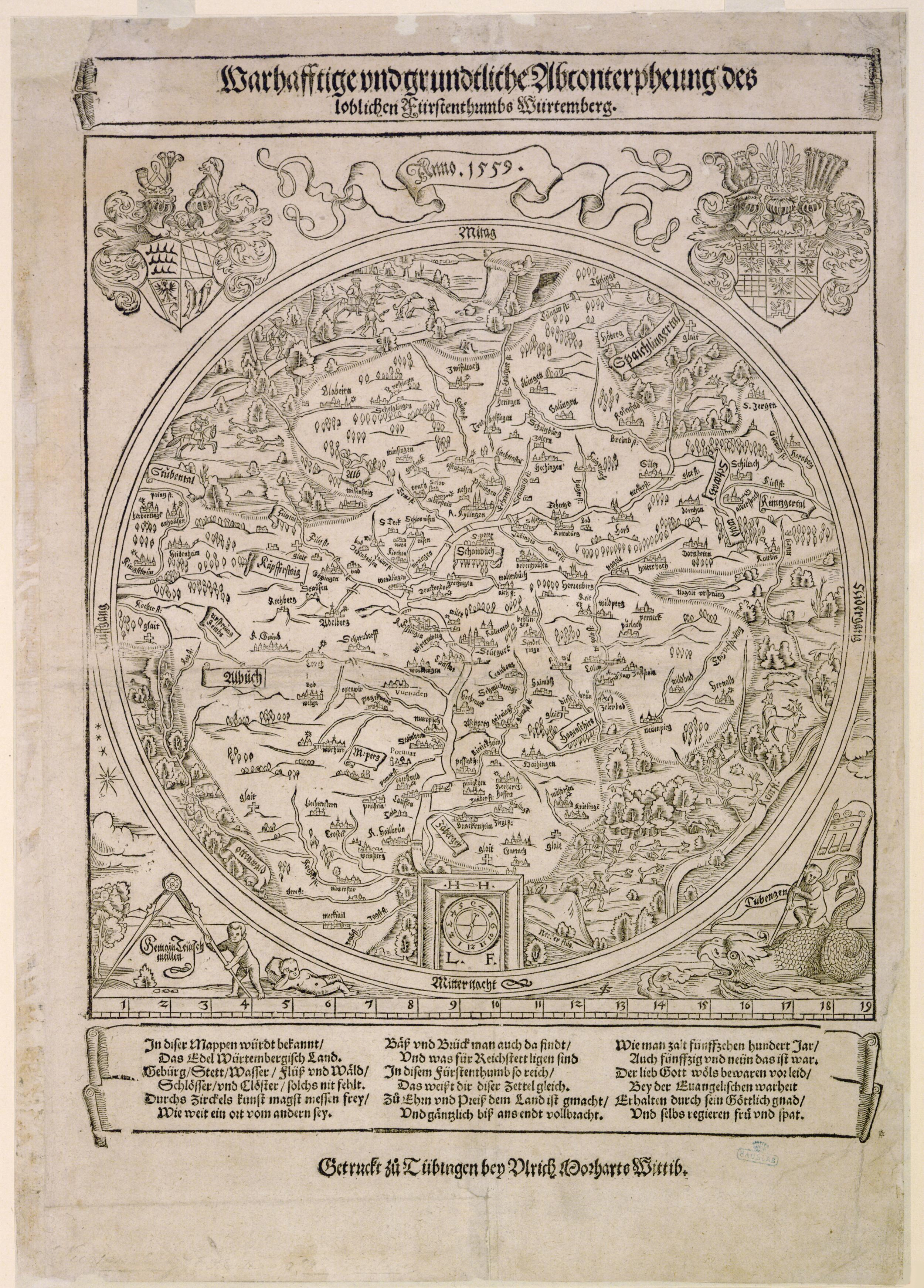 Württembergkarte aus dem Jahre 1559, vermutlich von Johann Scheubel (Monogramm J.S. 0 1494-1570)